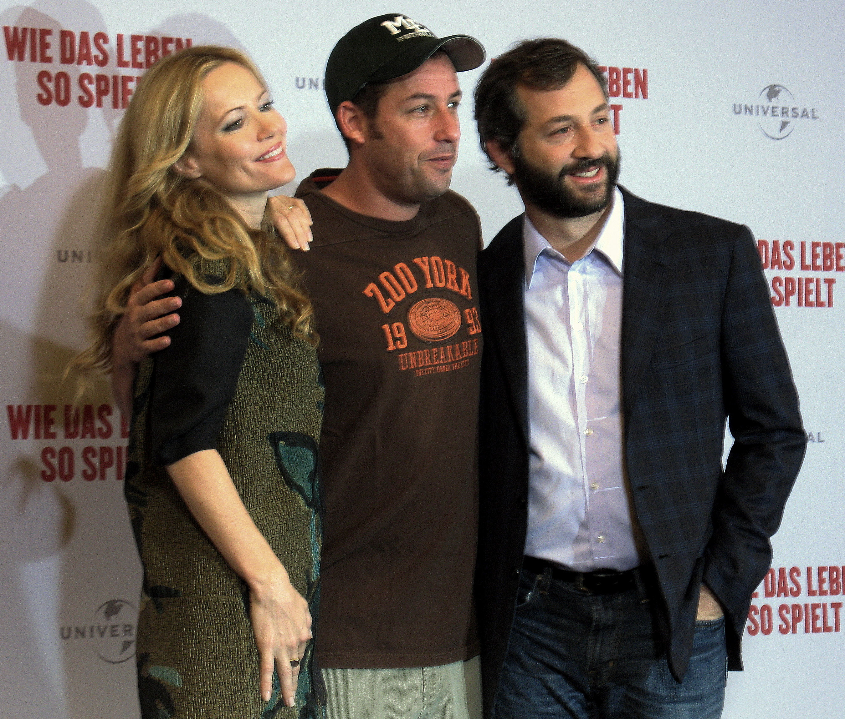 Pressekonferenz Funny People in Berlin, 26.08.2009